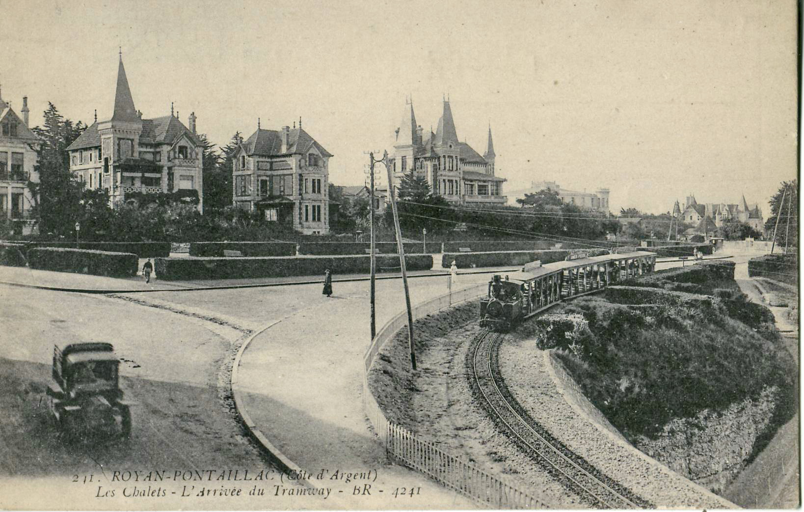 Carte postale ancienne éditée par BR, n° 241 ou 4241 : ROYAN-PONTAILLAC - Les Chalets - L'arrivée du Tramway (Tramway de Royan)